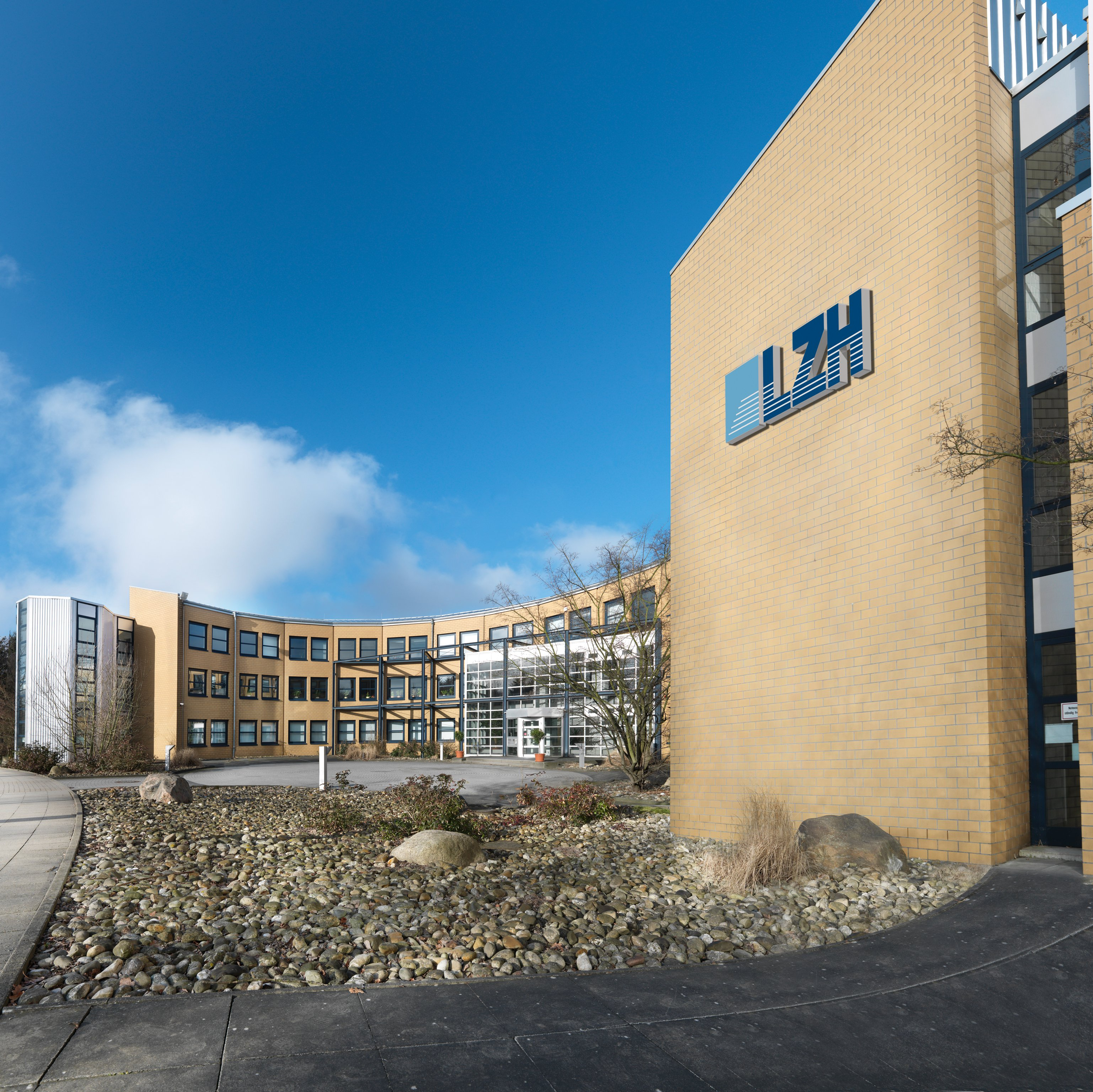 LZH in Hannover, Wissenschaftspark Marienwerder